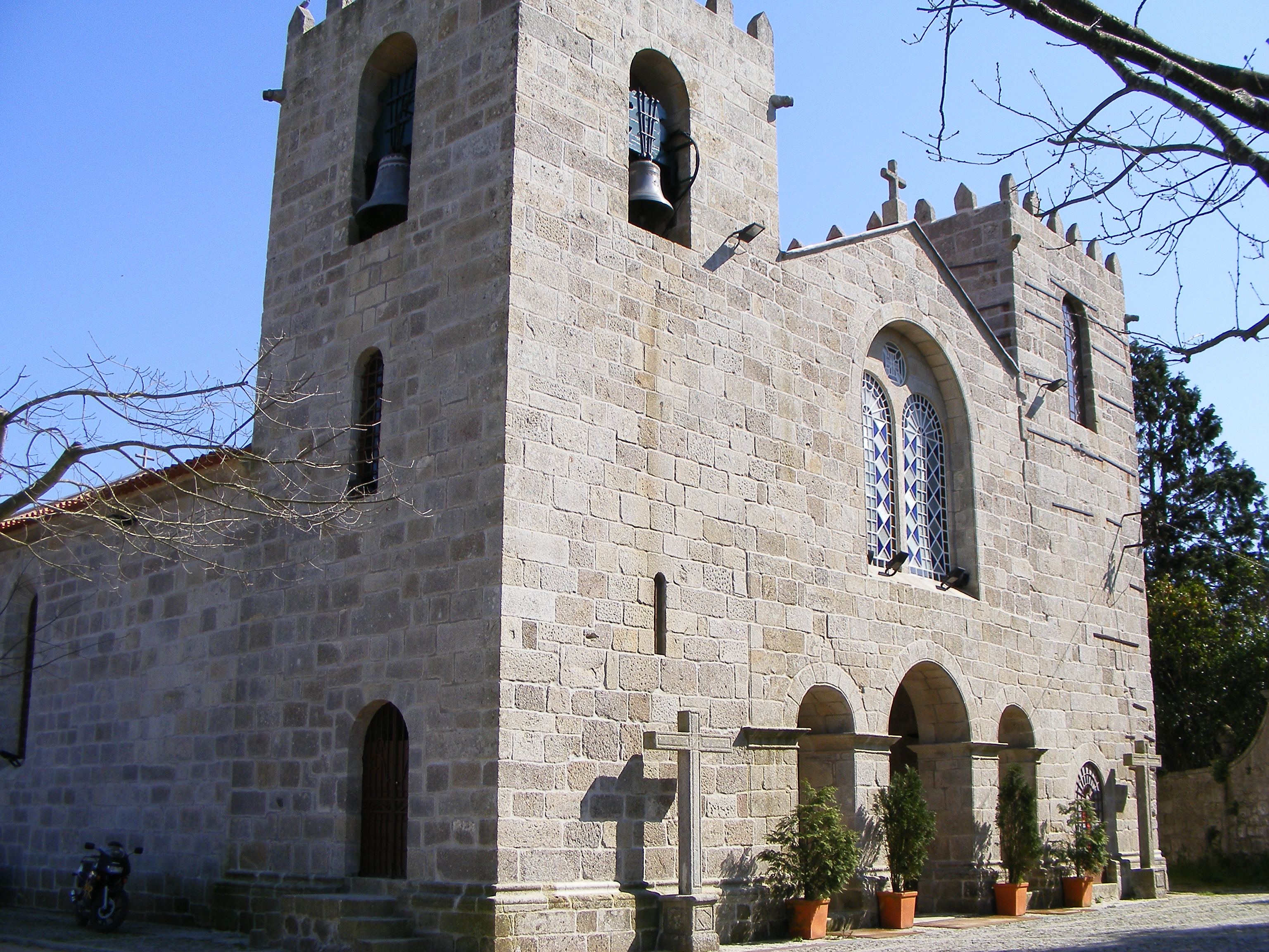 Mosteiro de Pedroso